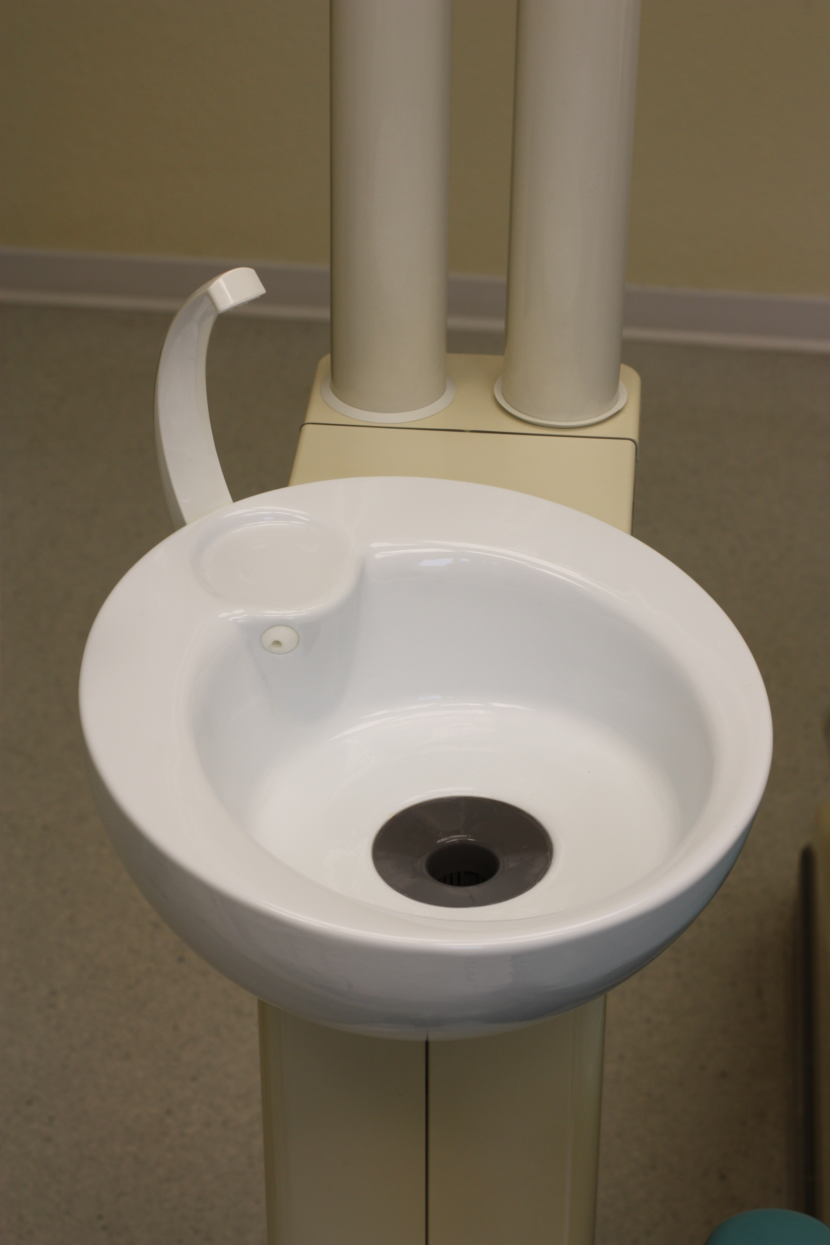 Speibecken an zahnärztlicher Behandlungseinheit